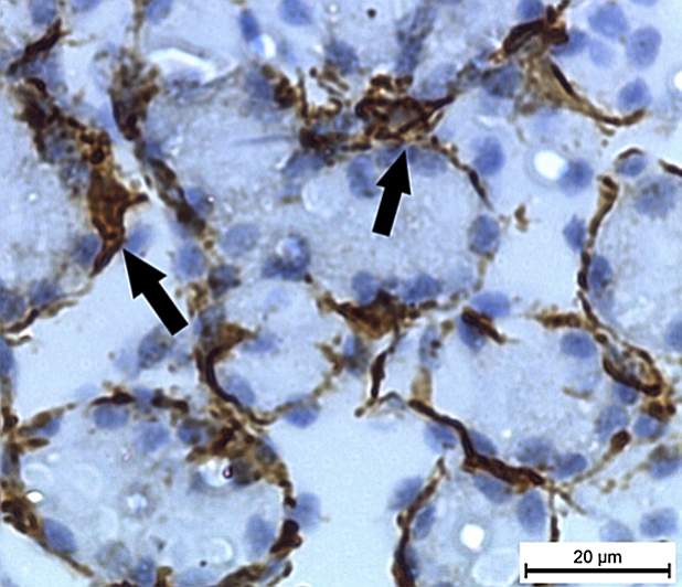 Células mioepiteliales (flechas), que rodean los acinos glandulares. Reacción de αSMA positiva fuerte. Barra de escala= 20 μm